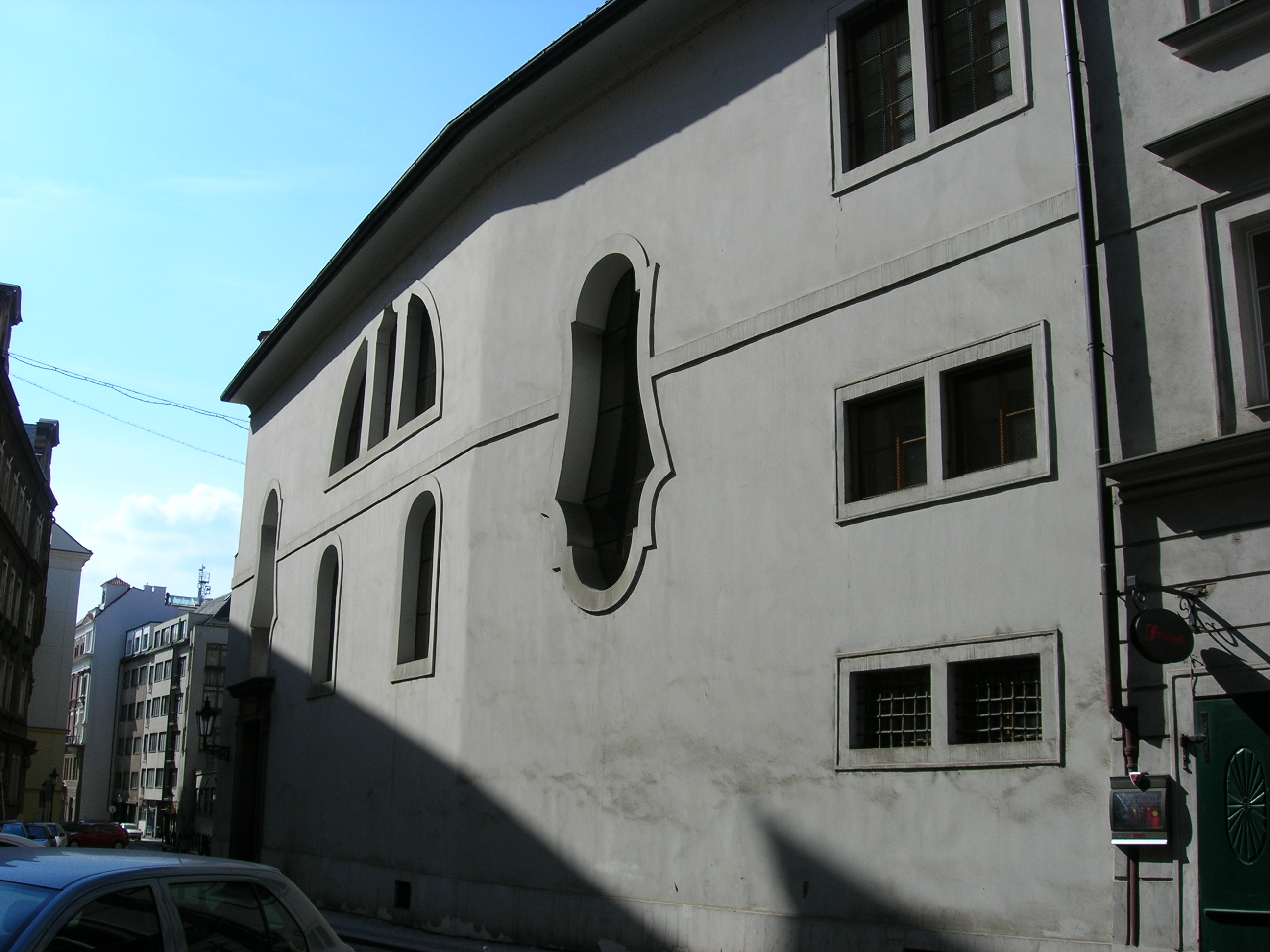 Church of saint Bartoloměj, Old Town, Prague. Kostel svatého Bartoloměje, Staré Město, Praha